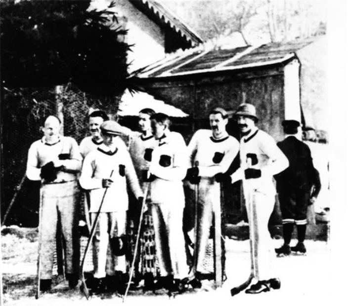 Первый чемпион Европы по хоккею с шайбой — сборная Великобритании в 1910 году.